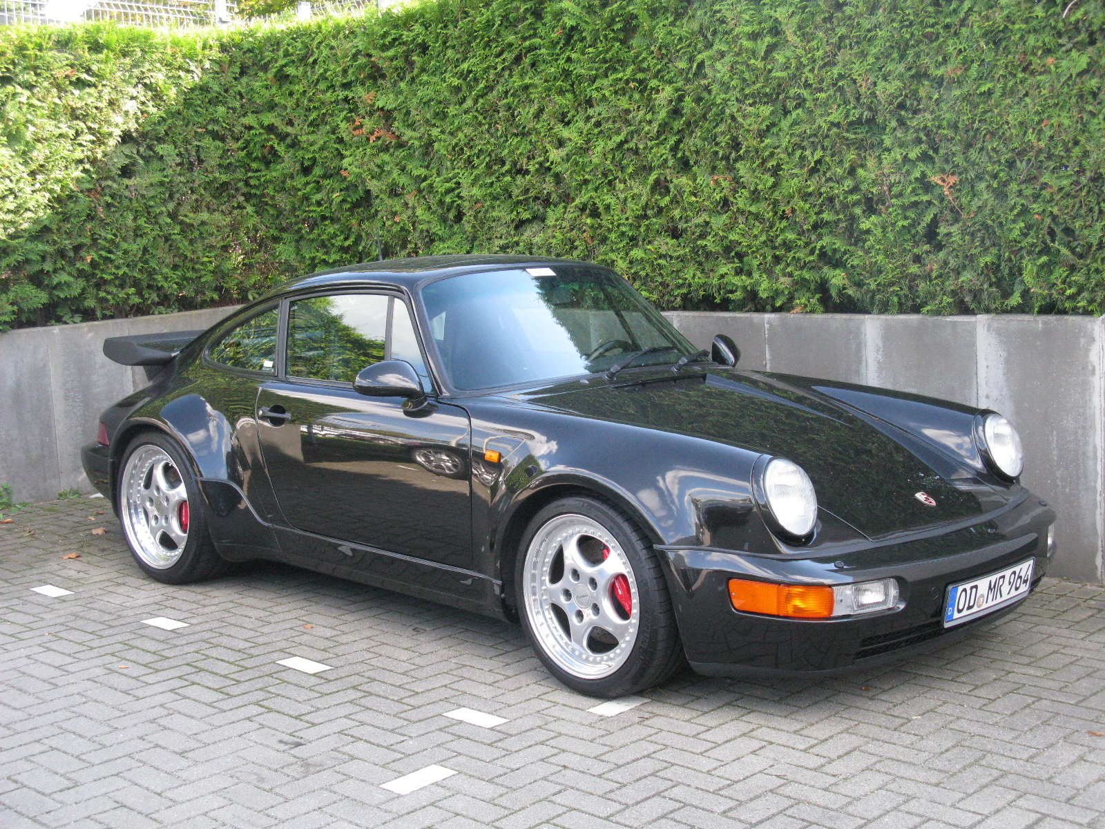 Porsche 911 (964) Turbo